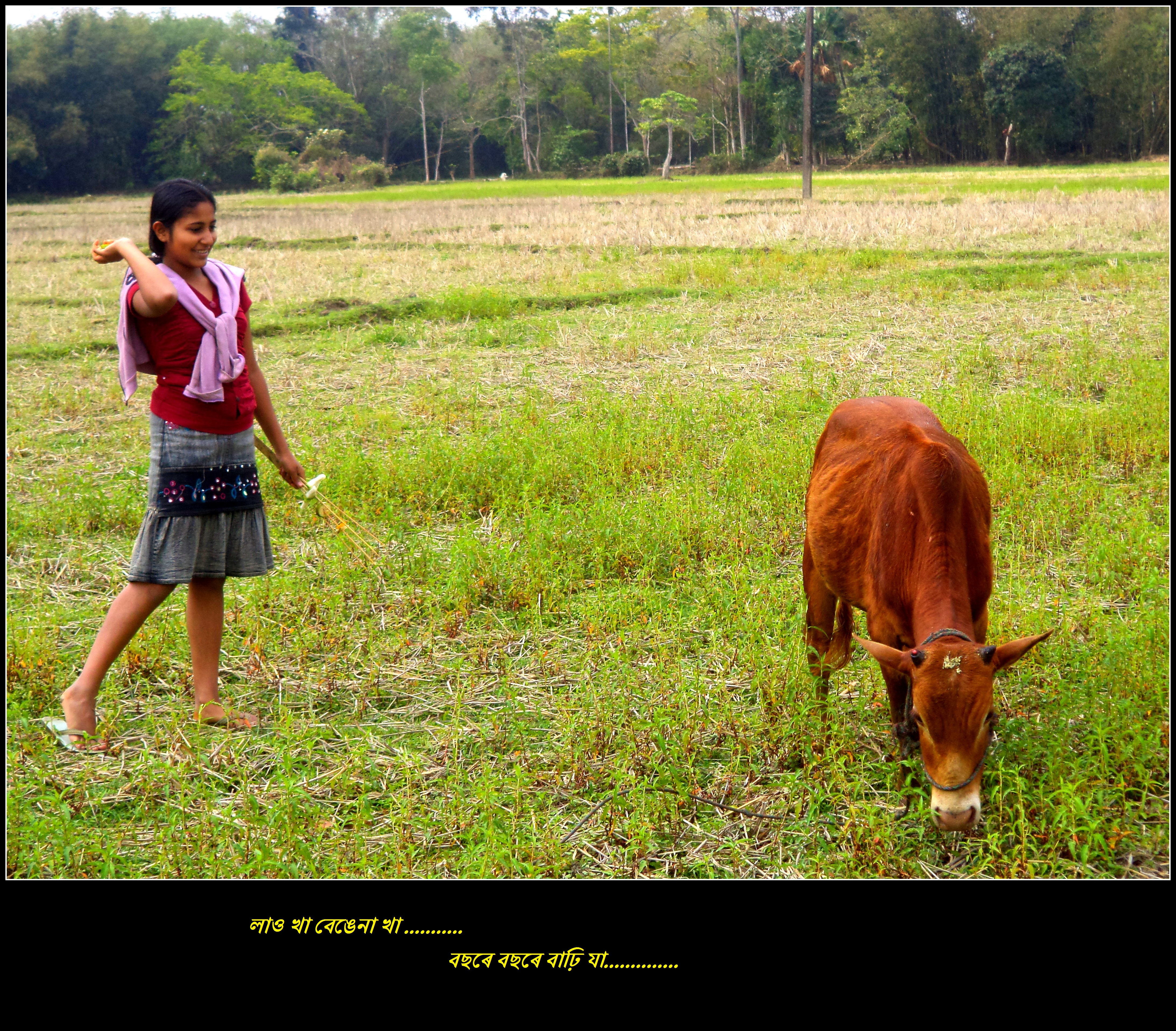 অসমীয়া: গৰুৰ গালৈ লাও-বেঙেনা দলিয়াইছে